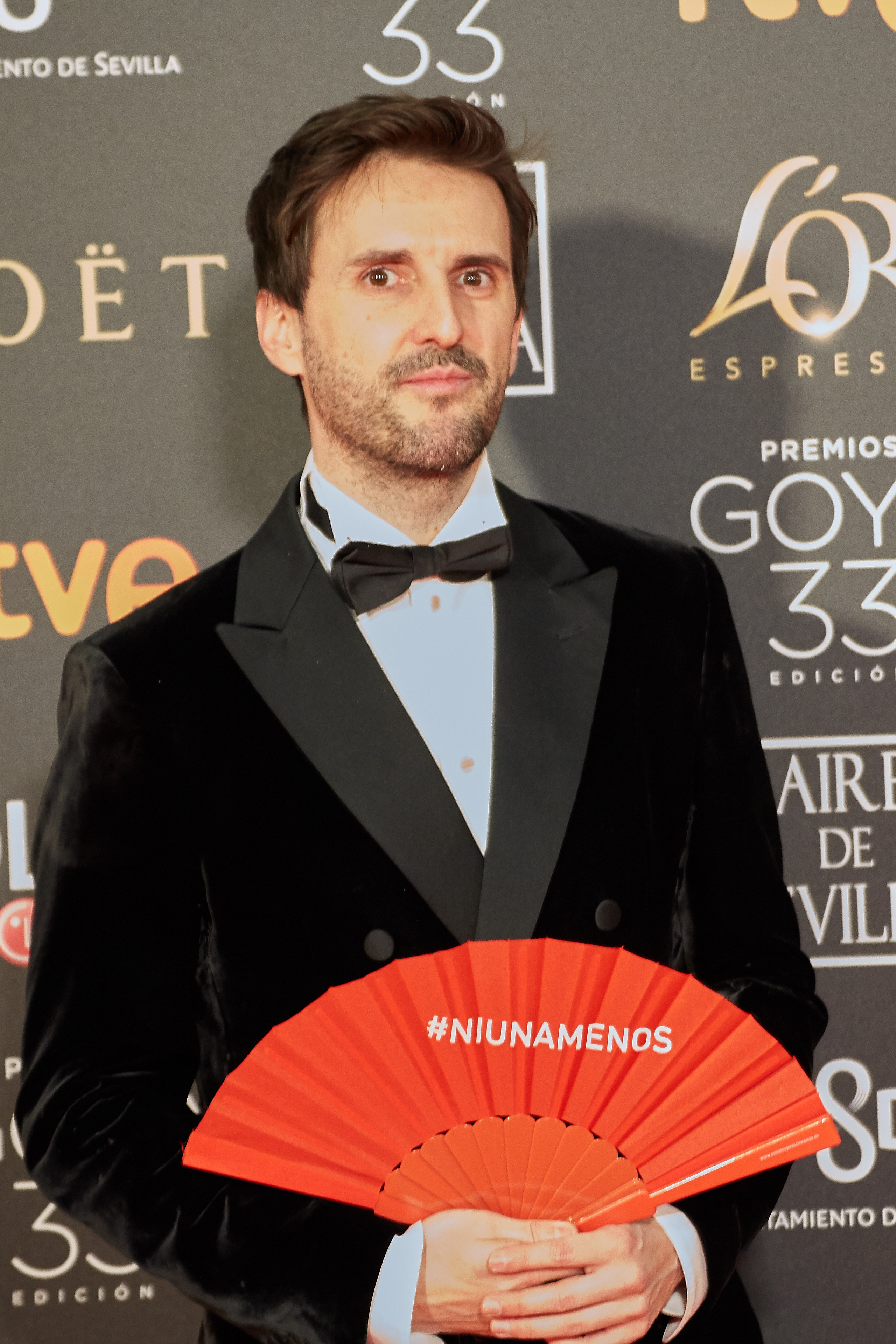 Julián López en la alfombra roja de los Premios Goya celebrados en Sevilla en Febrero 2019